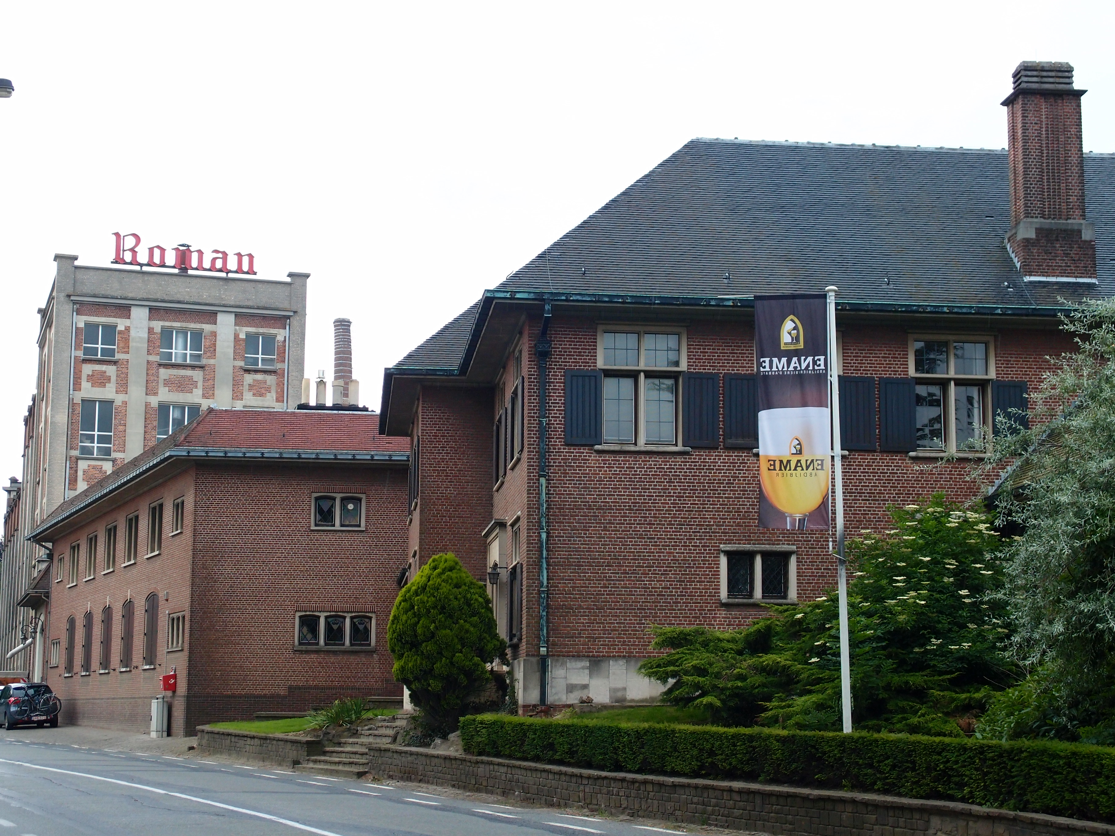 Belgische Brauerei "Roman" im Dorf Mater bei Oudenaarde Datum: 09.06.2014 Urheber: M. Pfeiffer alias Benutzer:Gordito1869 Quelle: Privates Fotoarchiv des Urhebers